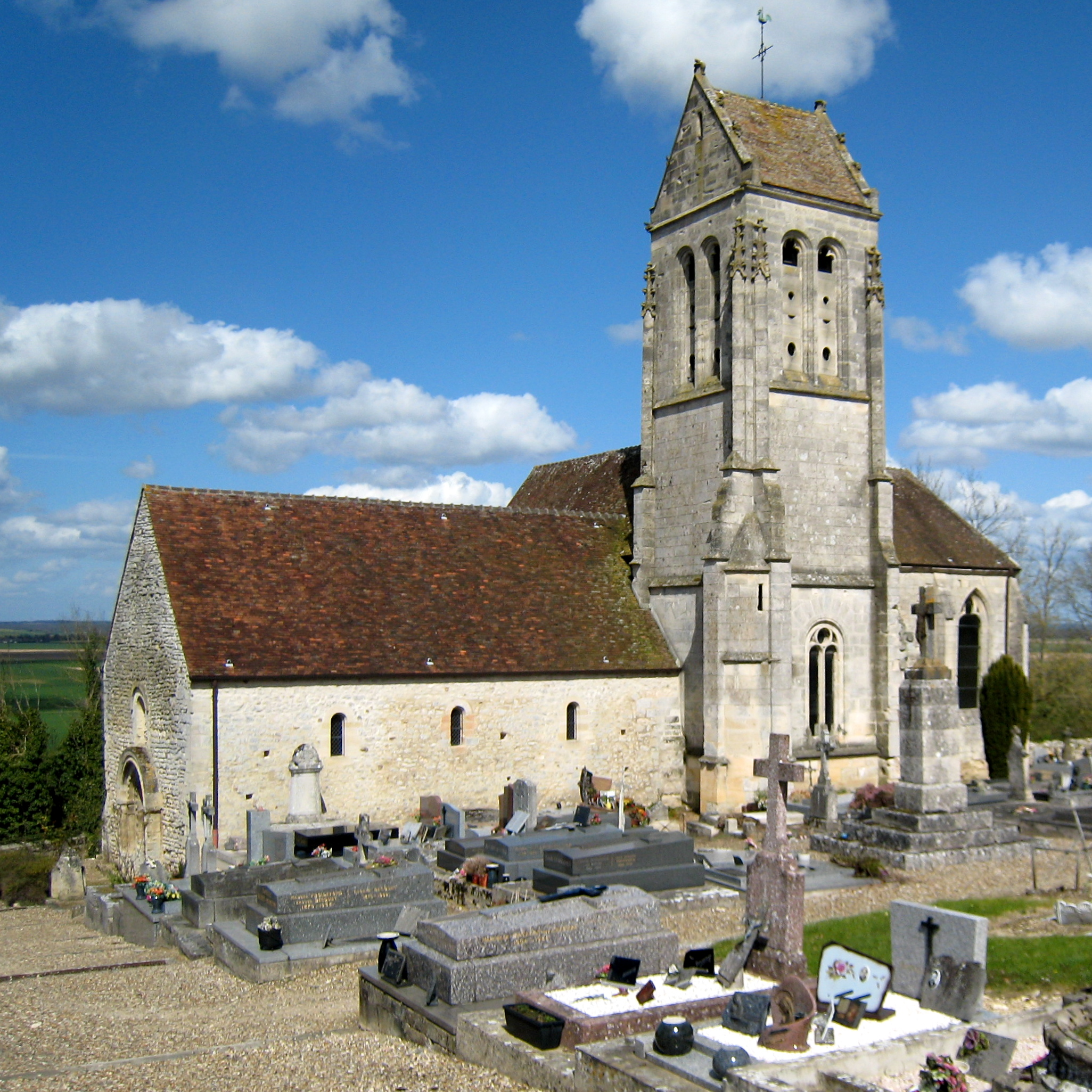 Église de Marquemont, Commune de Monneville, Oise, France